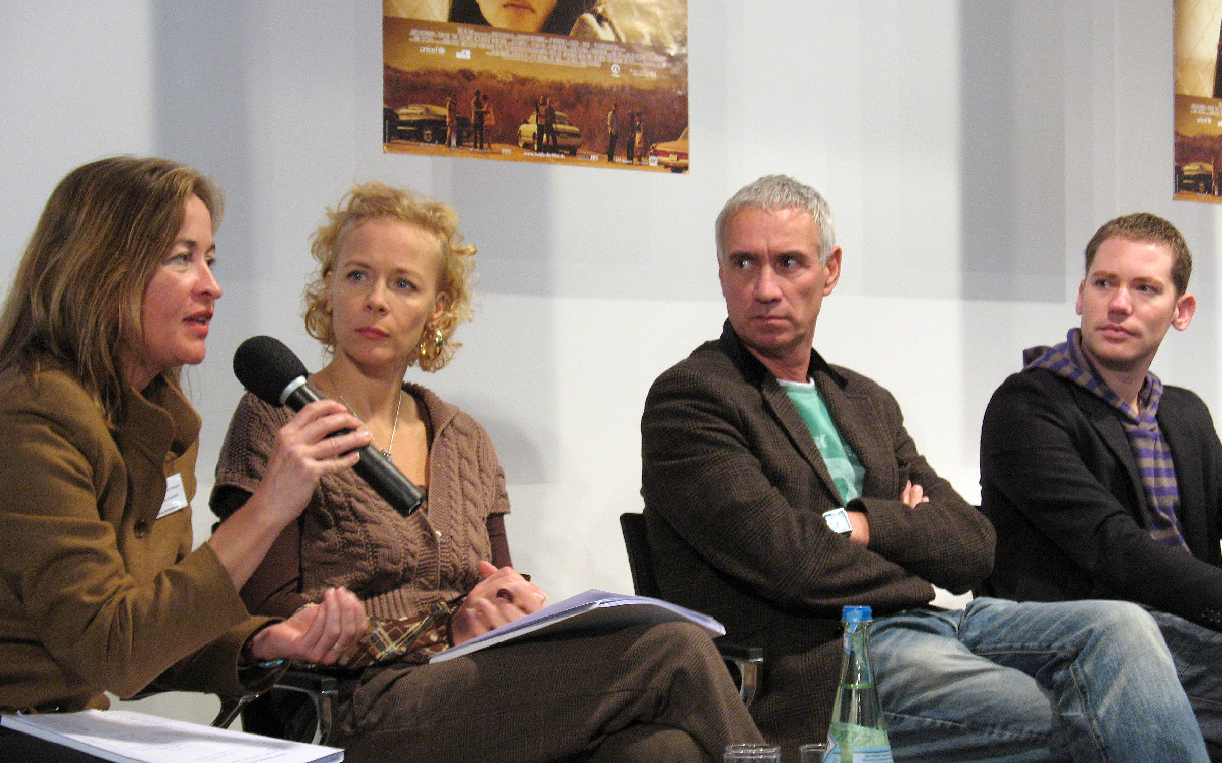 Ute Kretschmann (Plan International), Katja Riemann (UNICEF Goodwill Ambassador), Roland Emmerich und Marco Kreuzpaintner bei der Pressekonferenz zur deutschen Filmpremiere Trade, Berlin, 11.10.2007